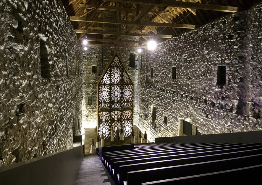 Innenansicht der Burg Riom mit der Kulisse zur Oper "Benjamin" 2015